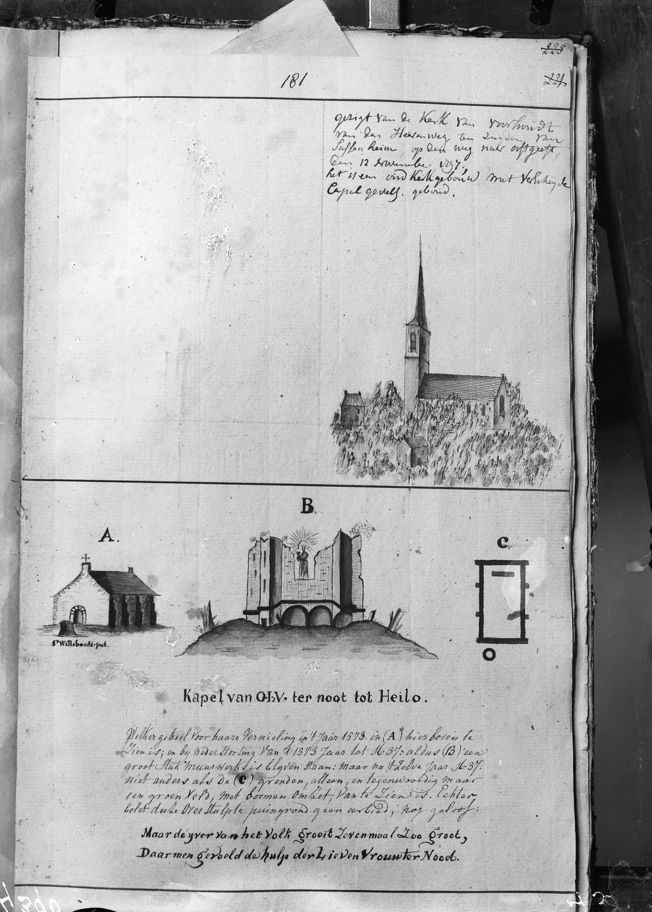 O.L.Vr.Kapel: opstand, plattegrond en ruïne Hs.Verhees